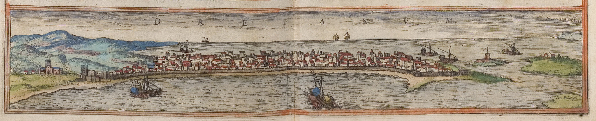 Trapani